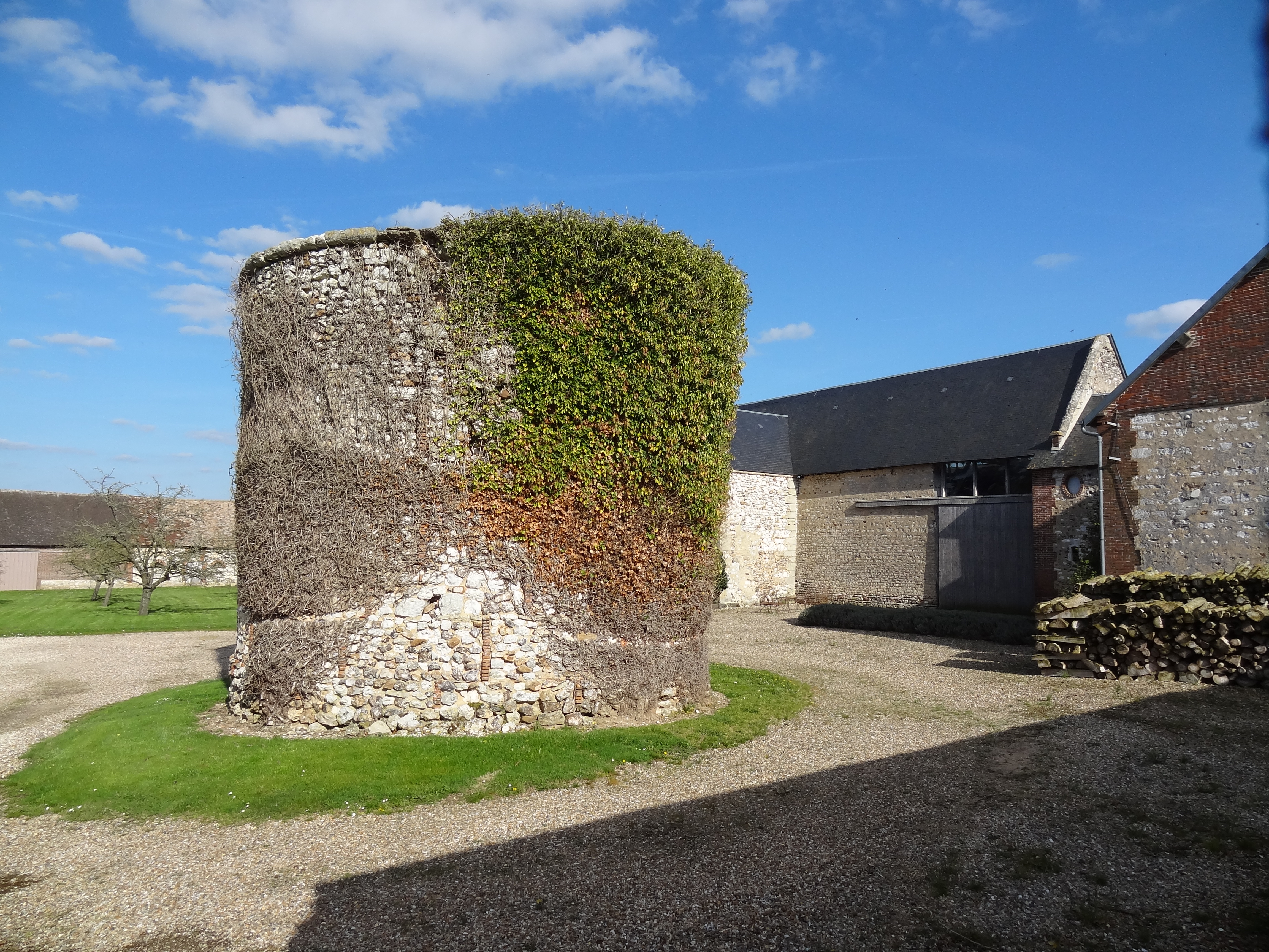 Manoir appartenant au domaine de l'abbaye de Jumièges. Colombier.